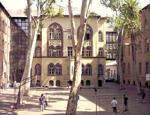 Leövey Klára Gimnázium udvara, Budapest